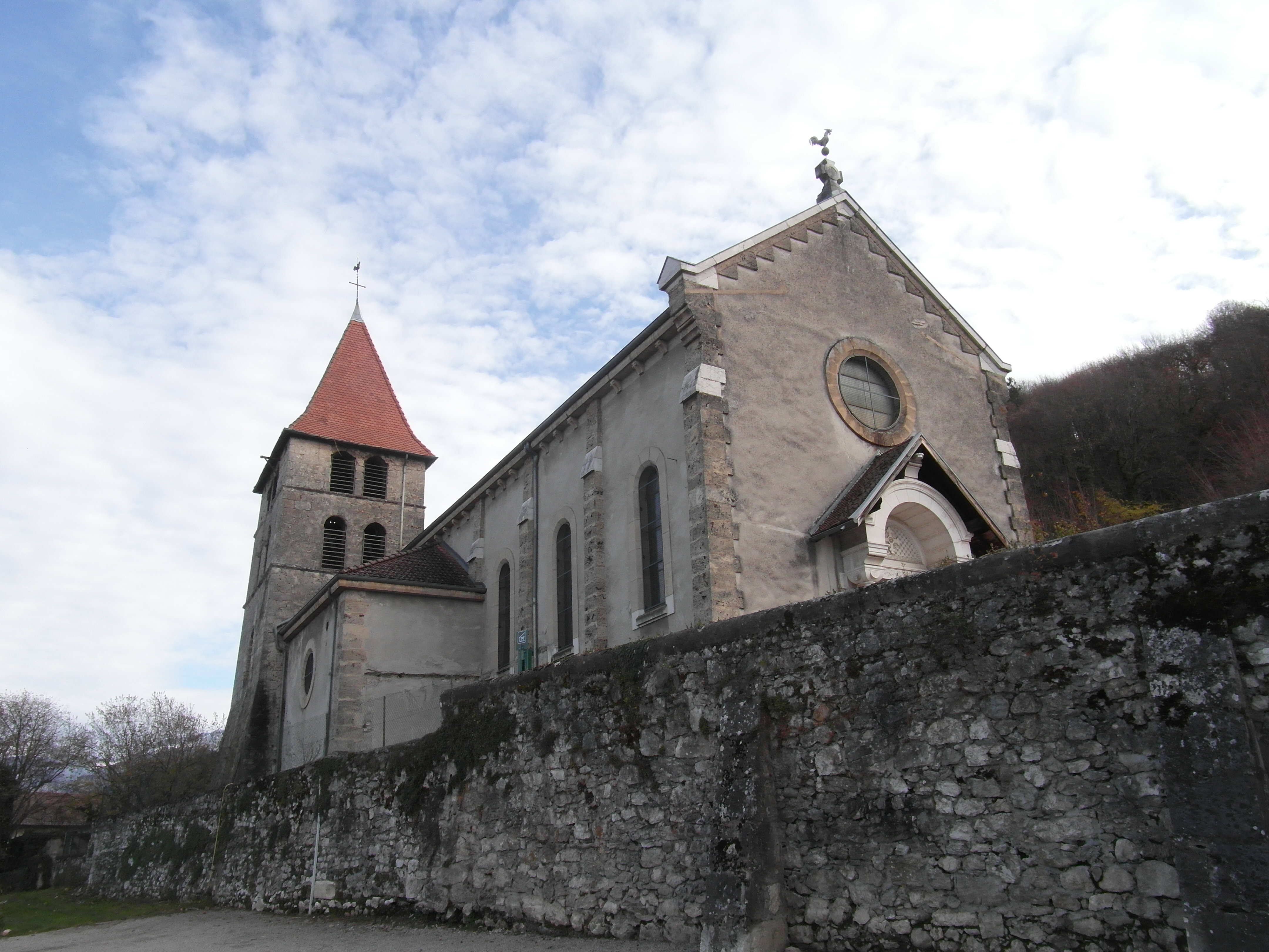 Église de Saint-Quentin-sur-Isère